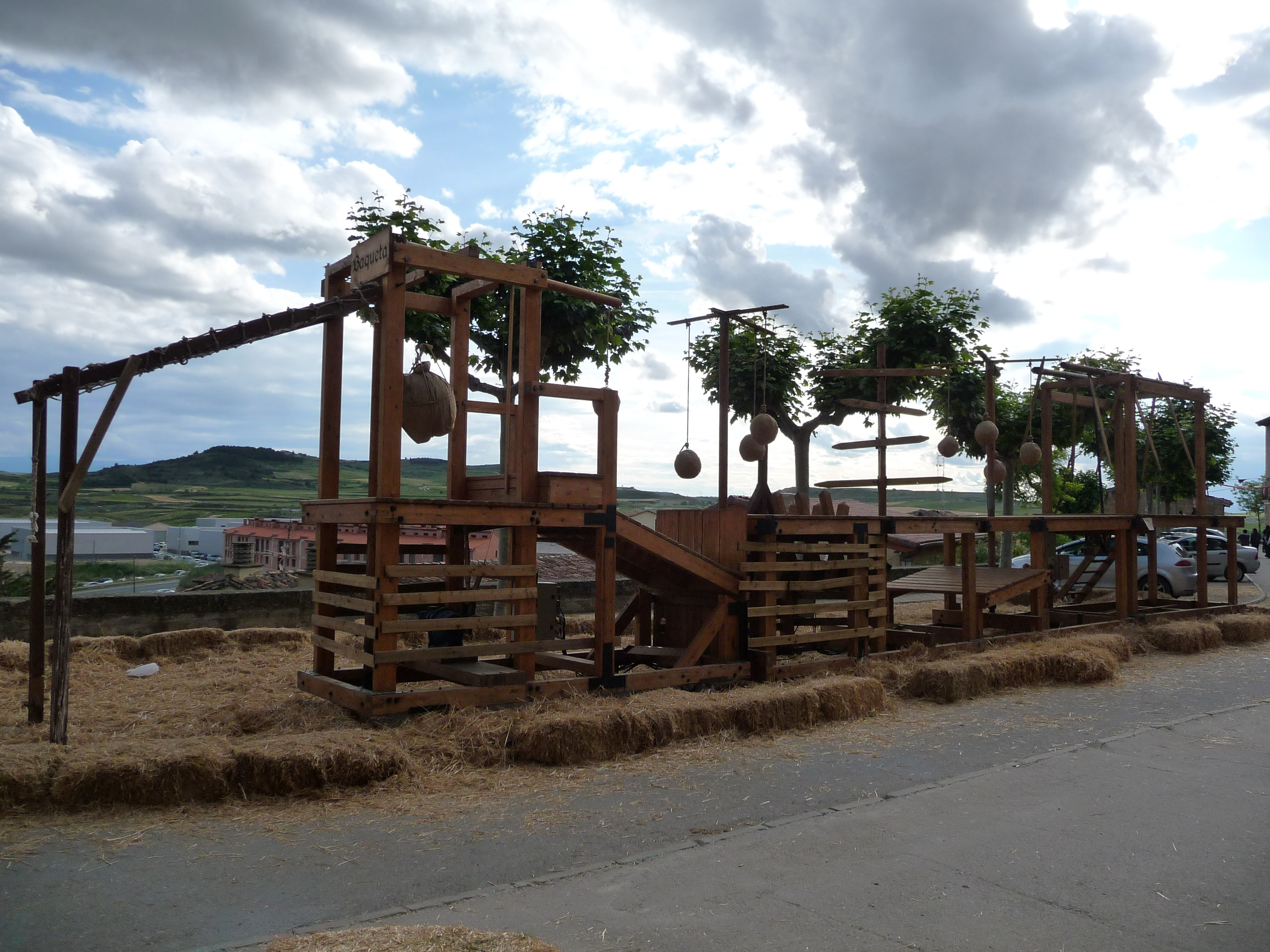 Jornadas Medievales de Briones. Baqueta medieval.